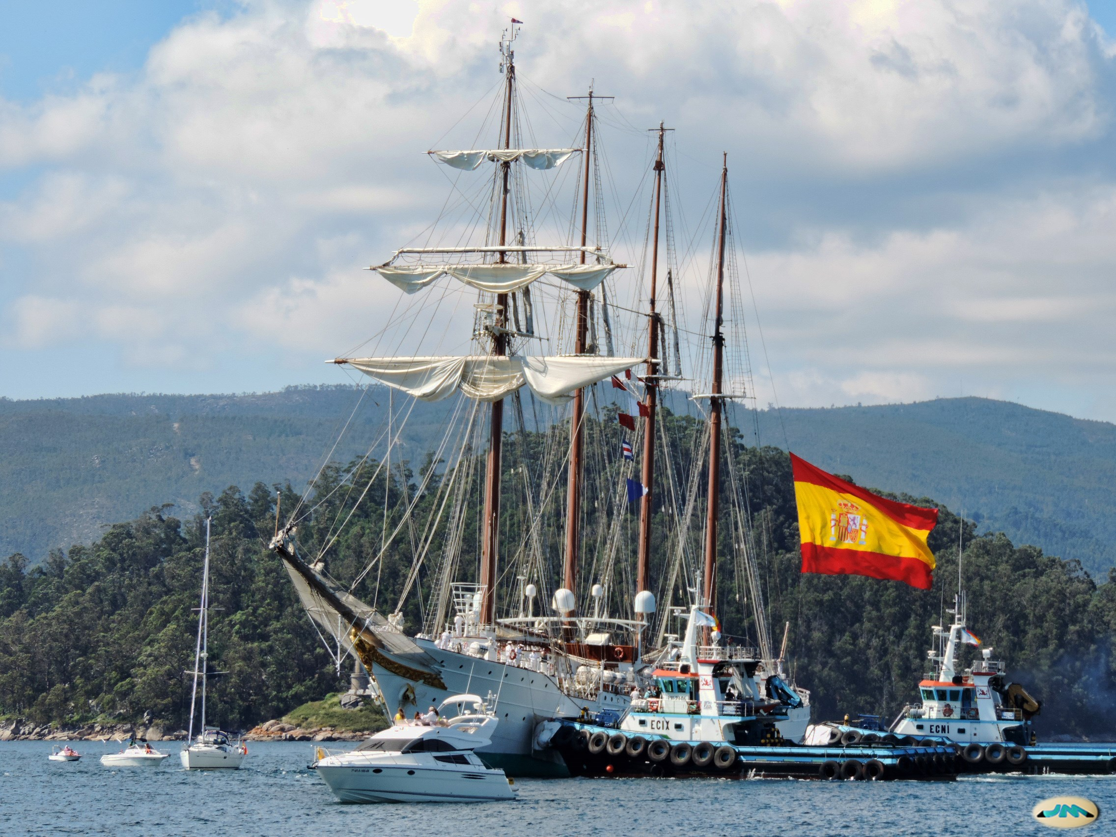 Juan Sebastián Elcano remolcado al muelle